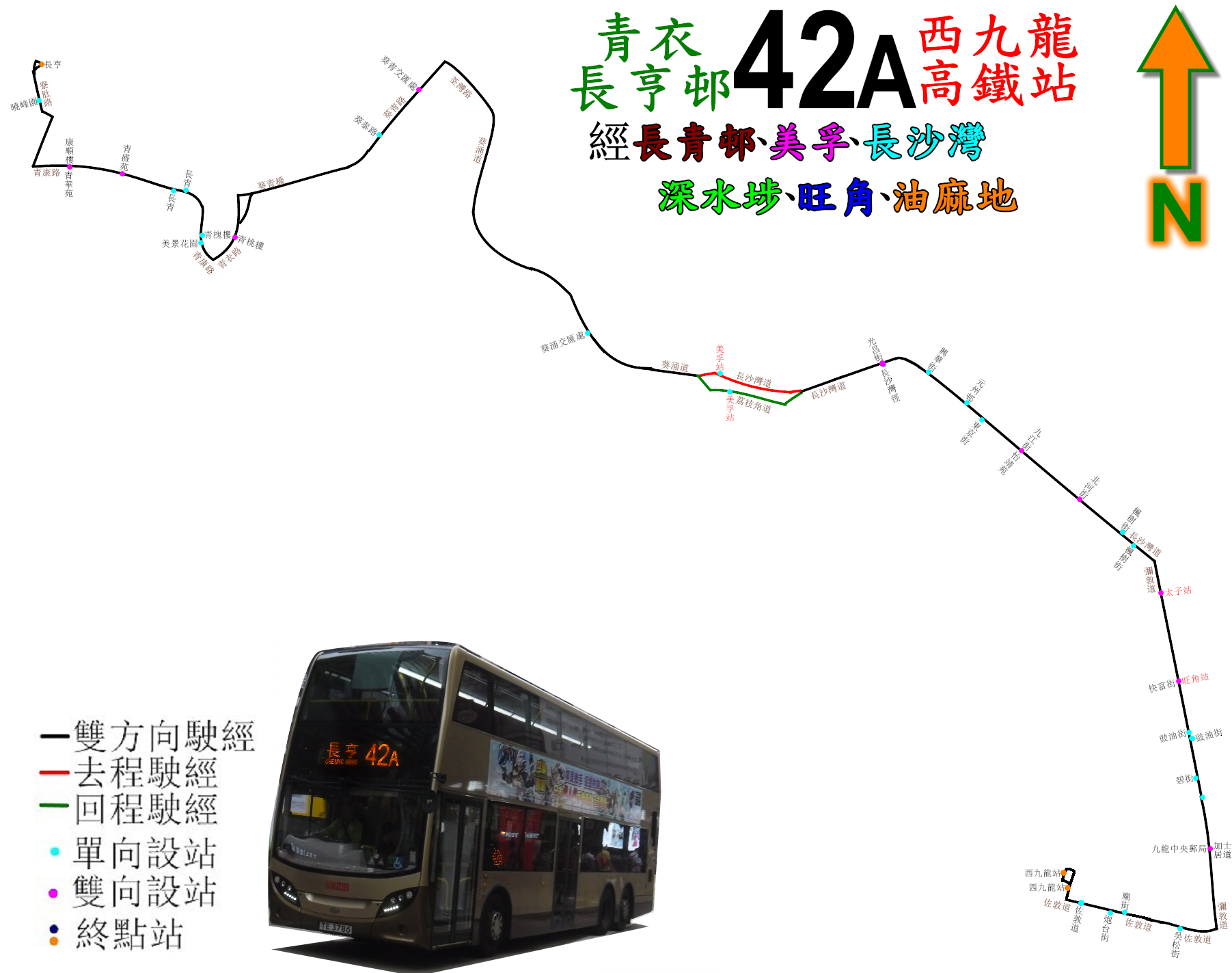 中文（香港）: 九巴42A線的走線圖